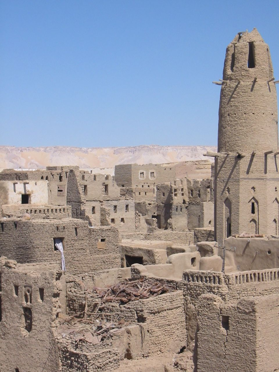 Western oases, El Kasr Egypt